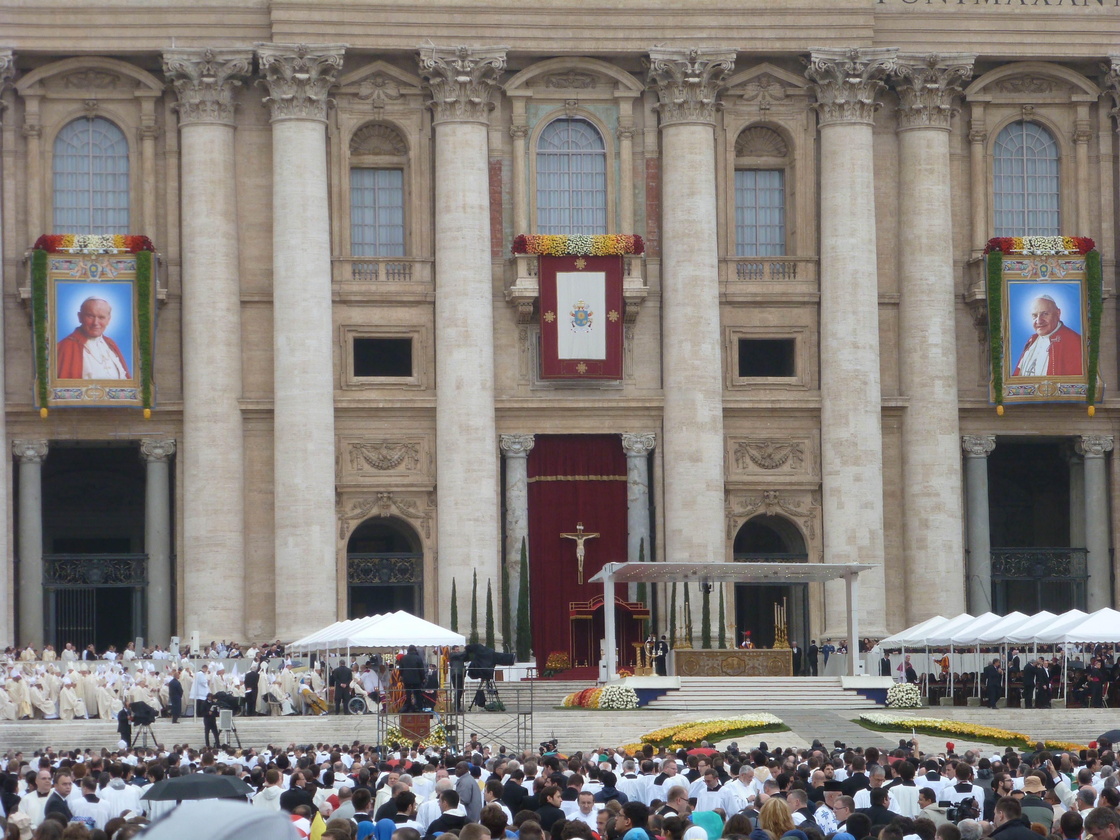 Parvis de la basilique Saint-Pierre de Rome le jour de la canonisation de Jean-Paul II et de Jean XXIII.